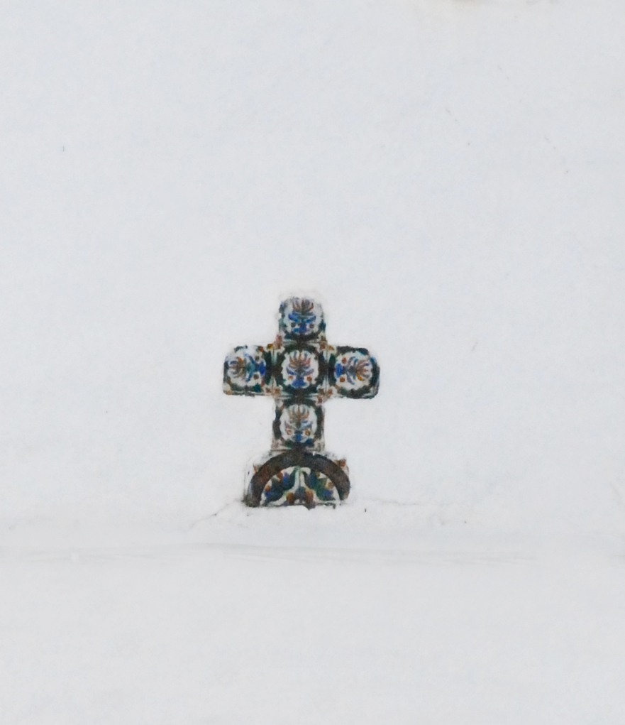 Azulejo de época medieval, donde se interpreta el Cristianismo (cruz) venciendo al Judaísmo (templo de salomón) y que se colocaba para hacer saber, que ese lugar era ya cristiano.